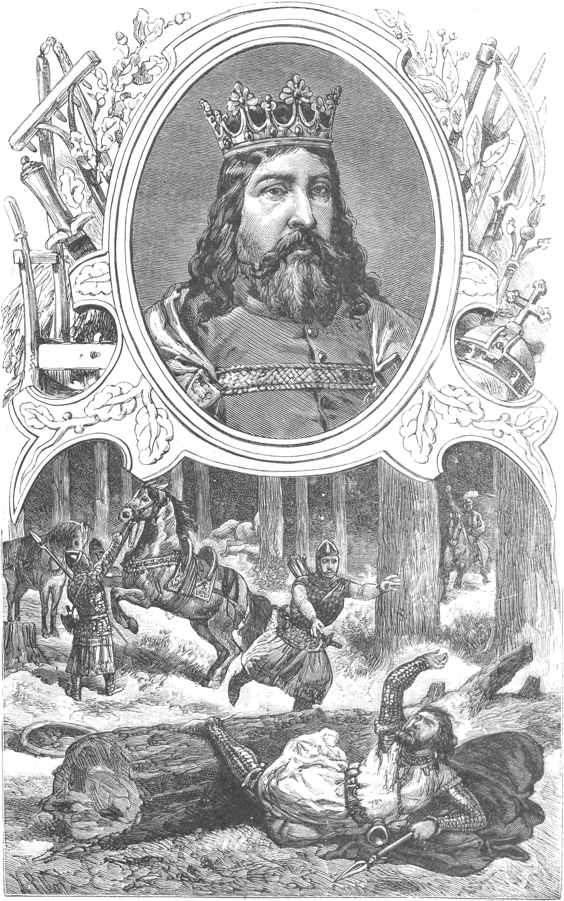 ilustracja z książki „Wizerunki książąt i królów polskich“